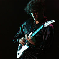 Turilli's custom guitar